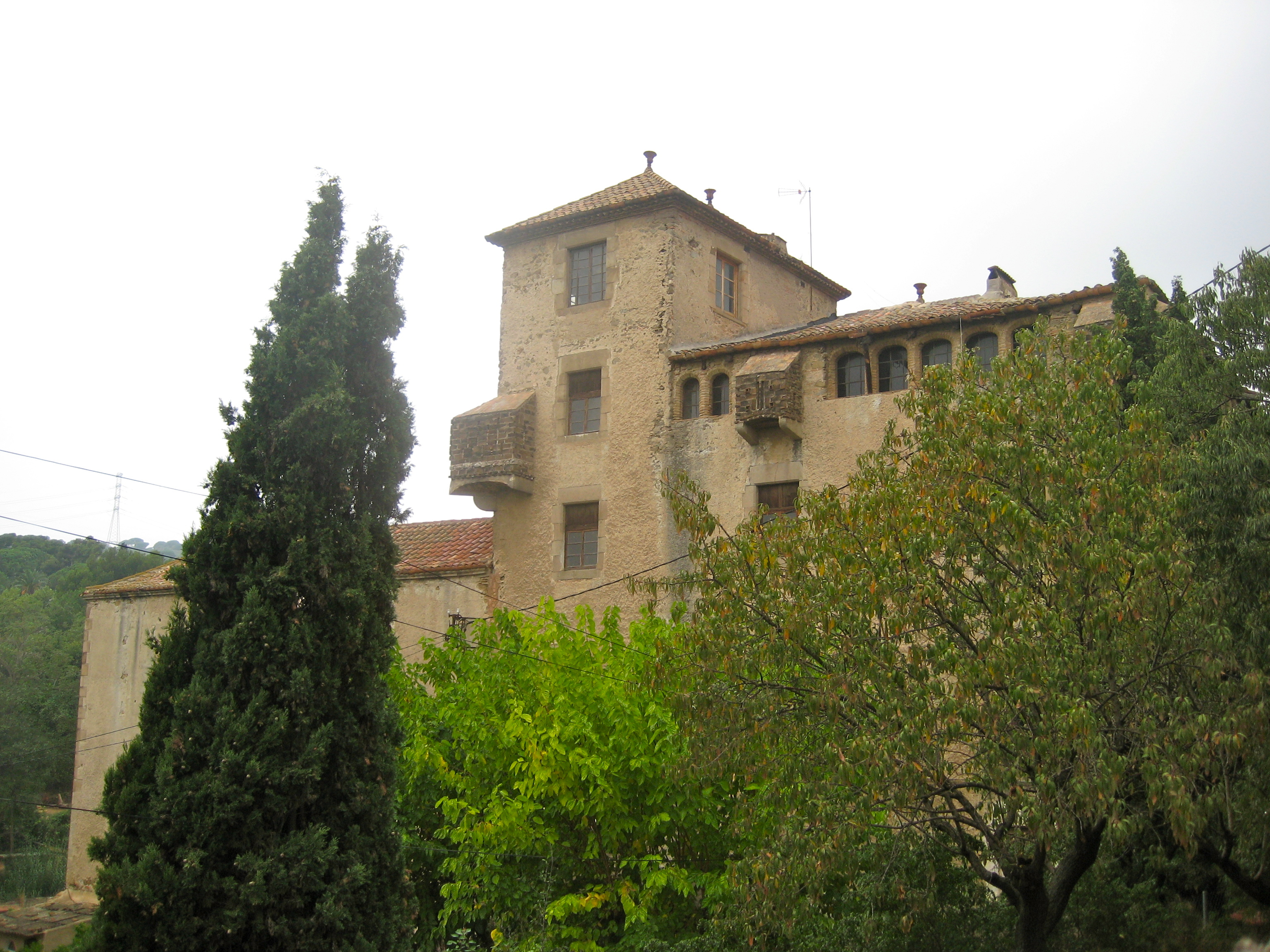 Gran casal fortificat segles XVI-XVII. Situat al barri de Canyet de Badalona.